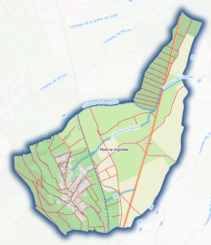 territoire de la ville de Mont-le-Vignoble, routes, chemin de fer, hydrographie, zones d'habitat (Fond openstreet Map et réalisation sous Qgis)